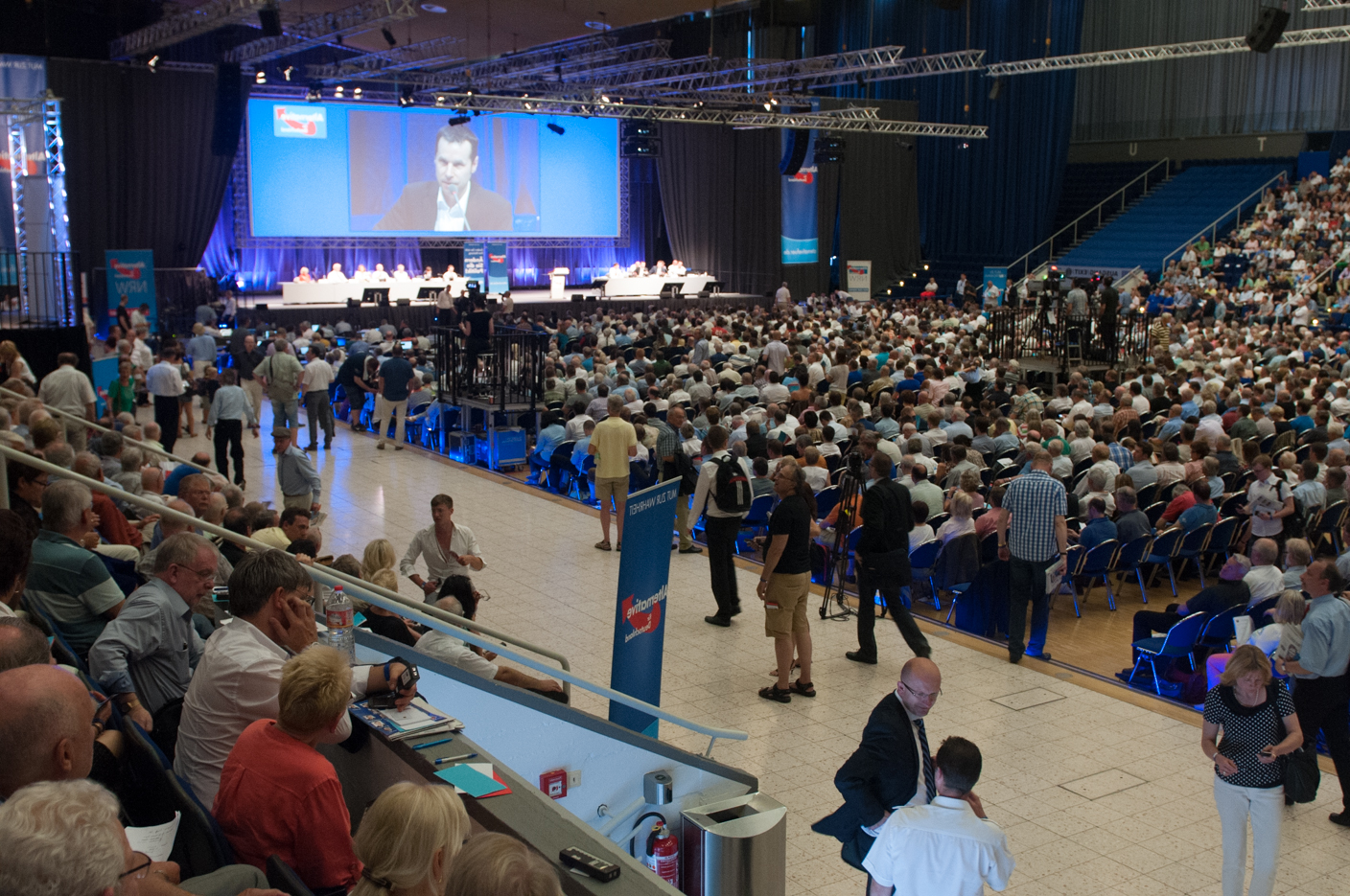 a.o. Bundesparteitag der Alternative für Deutschland, 4. Juli 2015 in Essen, Gruga Halle a.o. Bundesparteitag der Alternative für Deutschland am 4./5. Juli 2015 in Essen, Gruga Halle